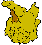 Localisation de la commune de Piteglio à l'intérieur de la province de Pistoia.